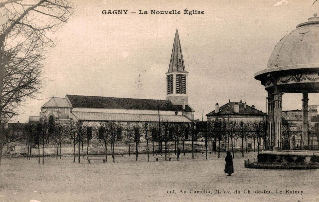 Gagny: La nouvelle église